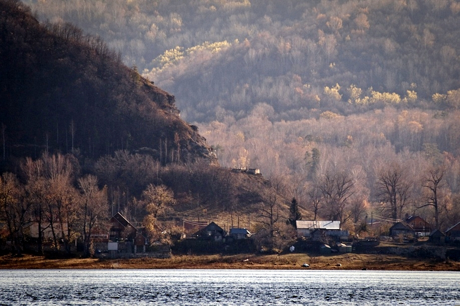 Посёлок Бахтлова Поляна, вид с полуострова Копылово